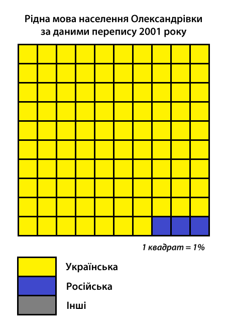 Інфографіка розподілу населення смт Олександрівка за рідною мовою згідно з даними перепису 2001 року. Джерело: Розподіл населення Кіровоградської області за рідною мовою (у % до загальної чисельності населення) за переписом 2001 року